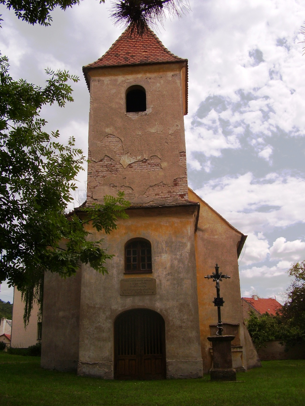 Kaple Nejsvětější Trojice, Jana Fibicha, Ivančice.